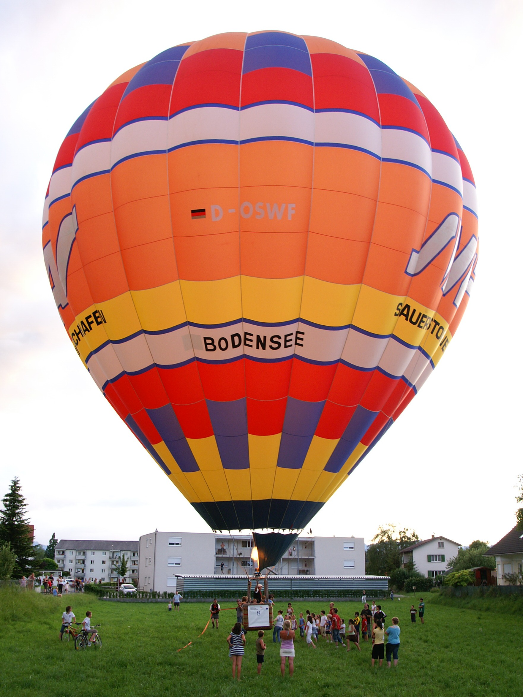 Heißluftballon Kennzeichen: D-OSWF; Volumen: 3600 m³; Baujahr: 1988; Hersteller: Schroeder fire balloons; Typ: G36/24; Werksnummer: 27; Aufschrift: SWF-Gas; Zum Anlass auf den "internationalen Ballontagen Alpenrheintal" [1] auf dem Brückenfestival [2] Wiesenrain in Lustenau - Widnau. Hier gelandet im Hatlerdorf .